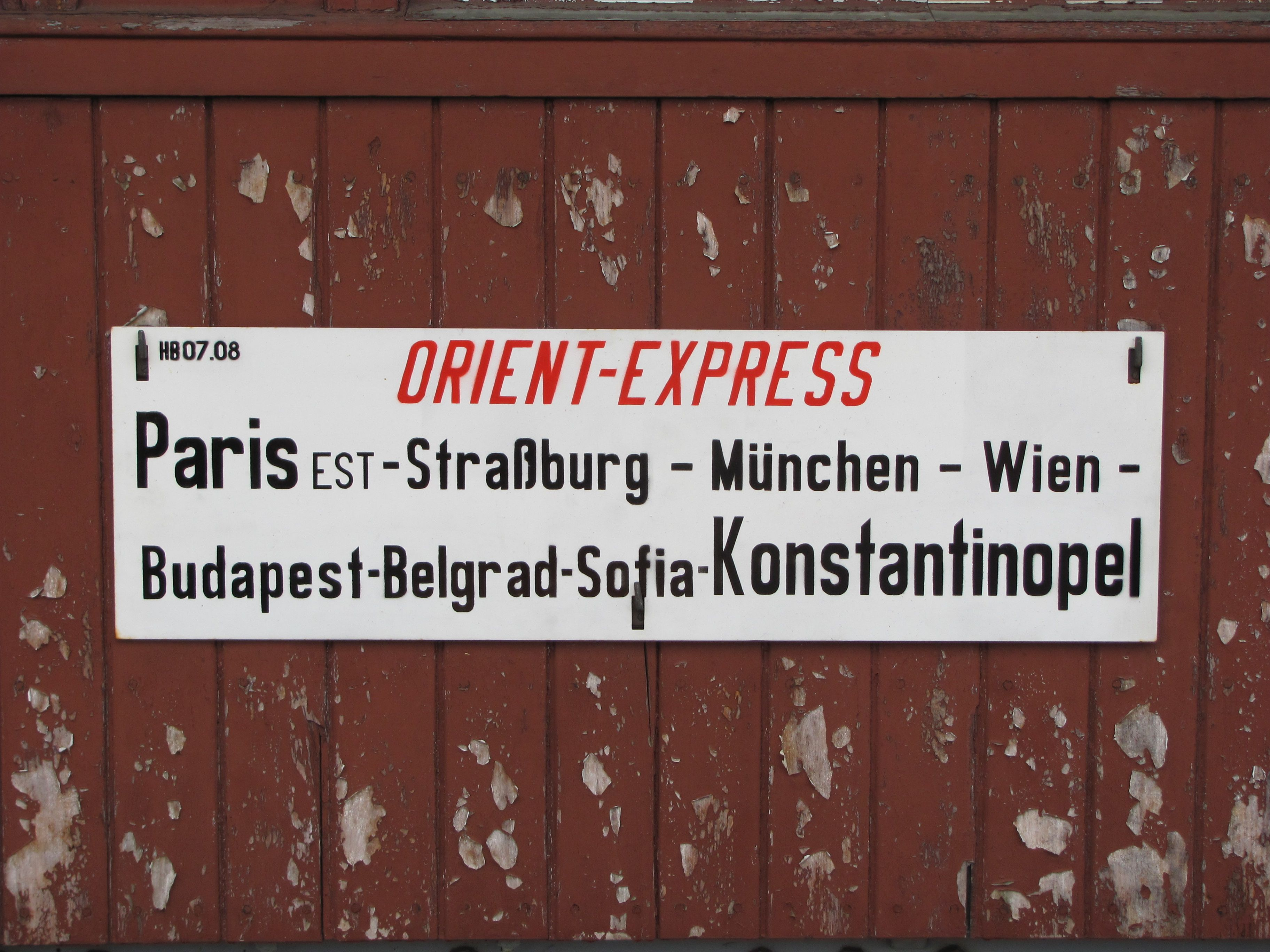 Laufschild Orient-Express